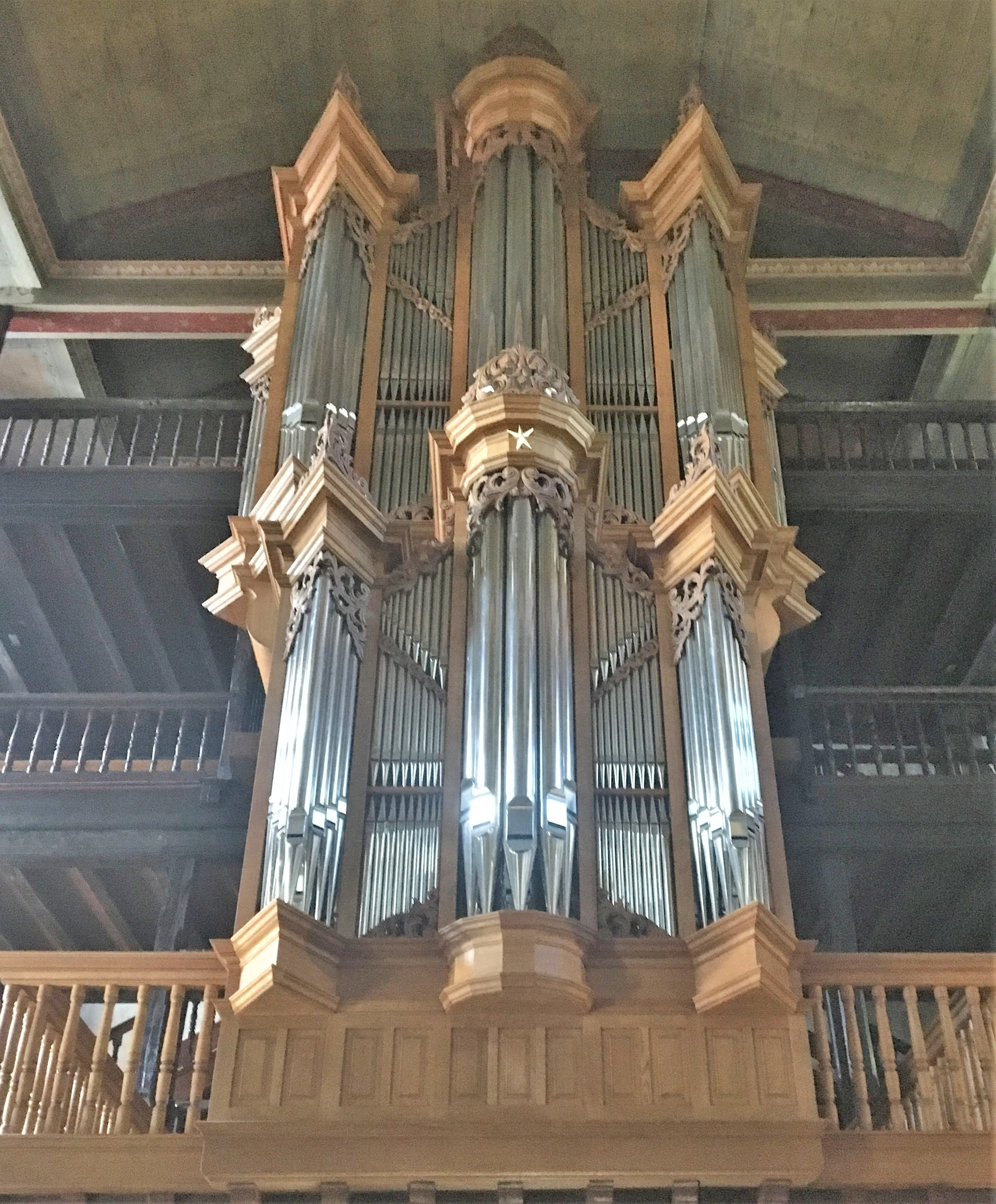 Orgue de Ciboure août 2019